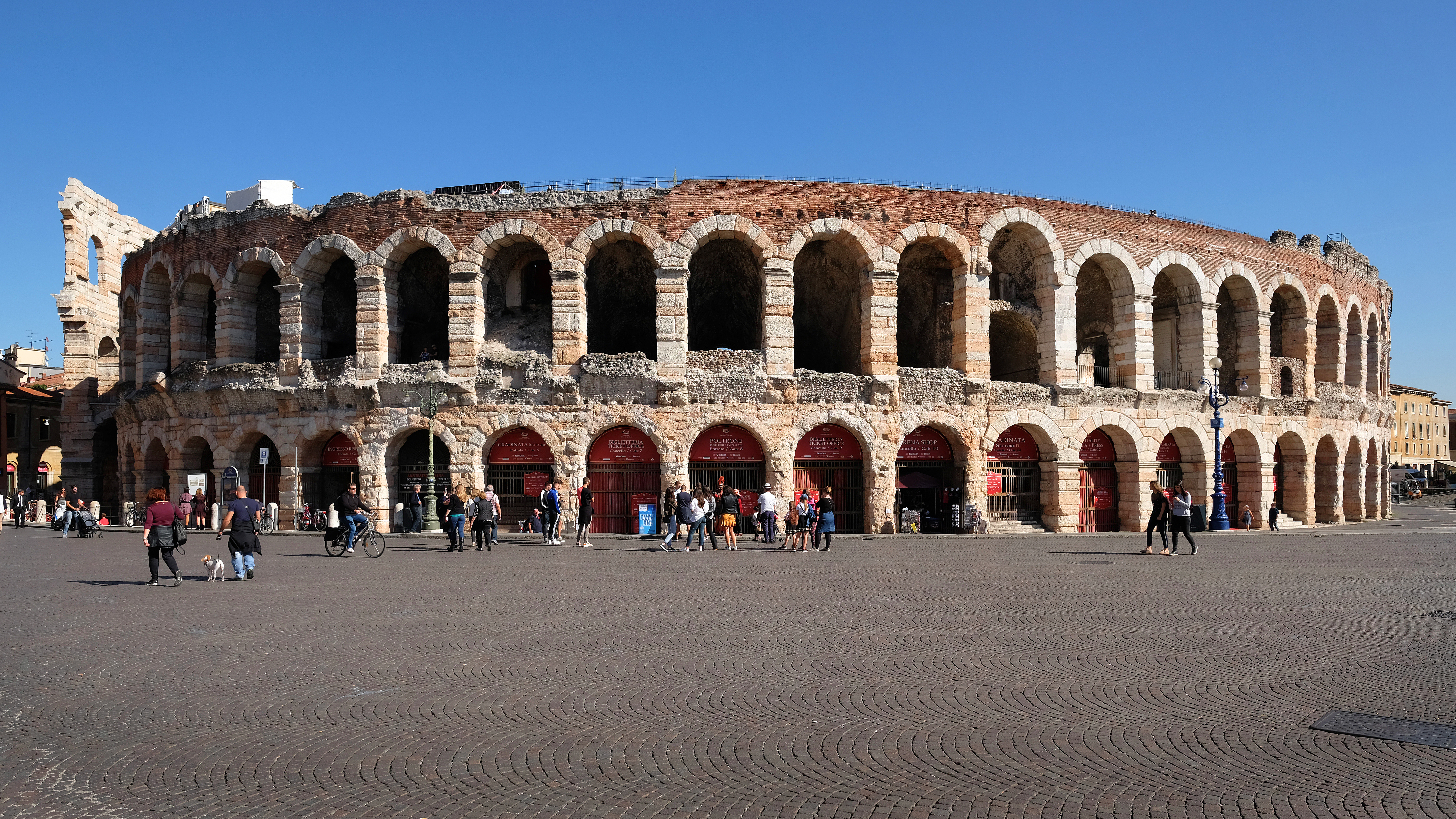 Arena di Verona This is a photo of a monument which is part of cultural heritage of Italy.